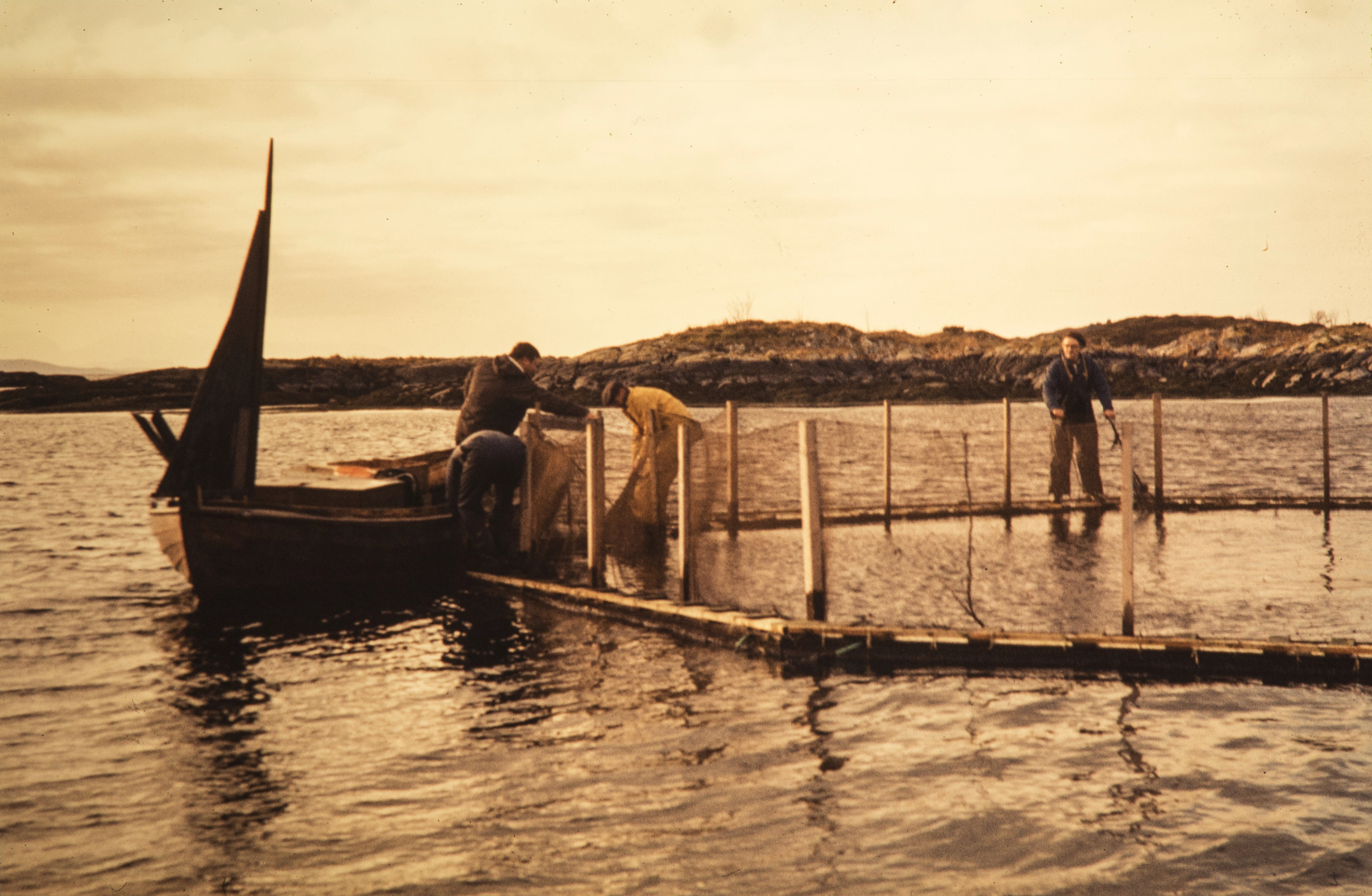 Ved Grøntvedt-brødrenes laksemerd på Hitra.